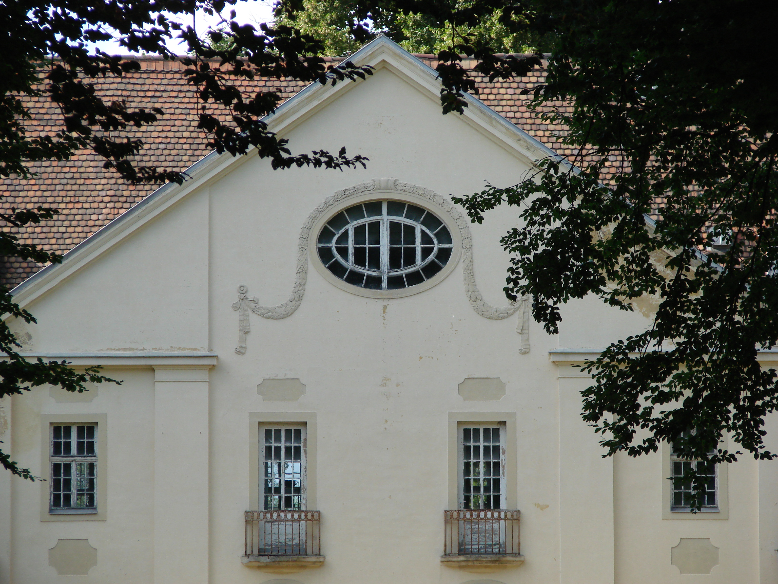 1521 als zweigeschossiger Putzbau errichtet